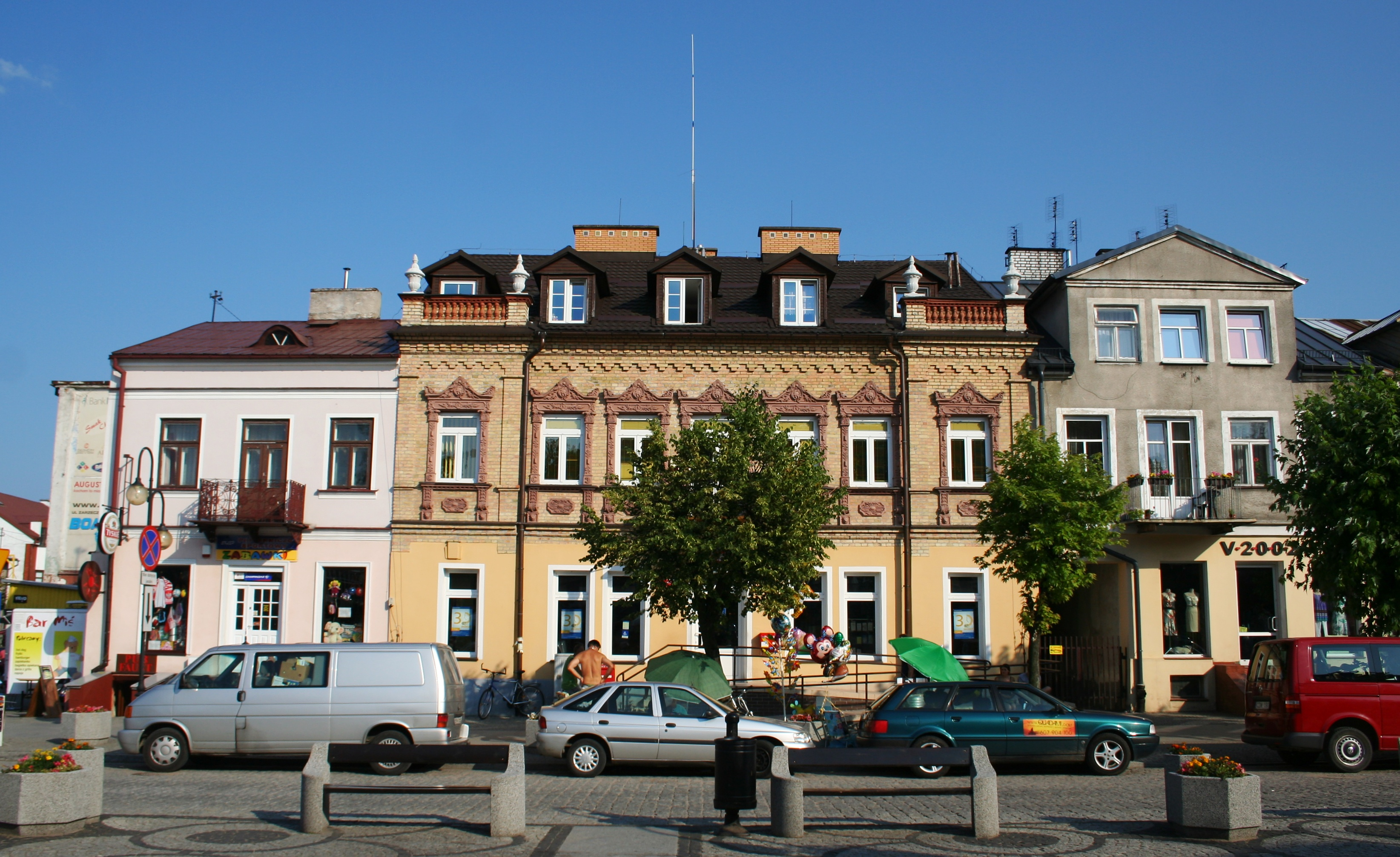 kamienica przy rynku w Augustowie